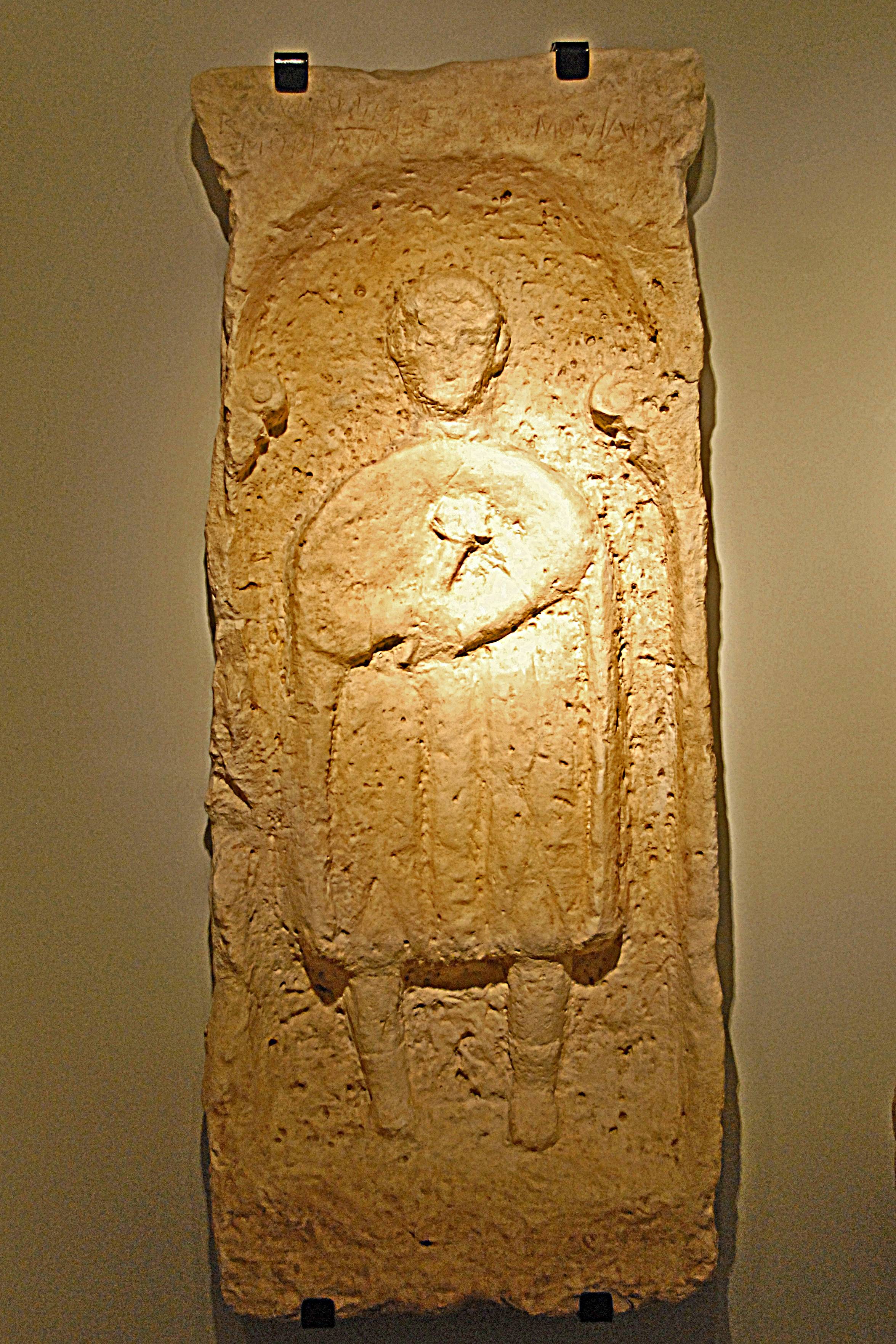 Civaux, Museum, Grabstele, 3.-4. Jh.